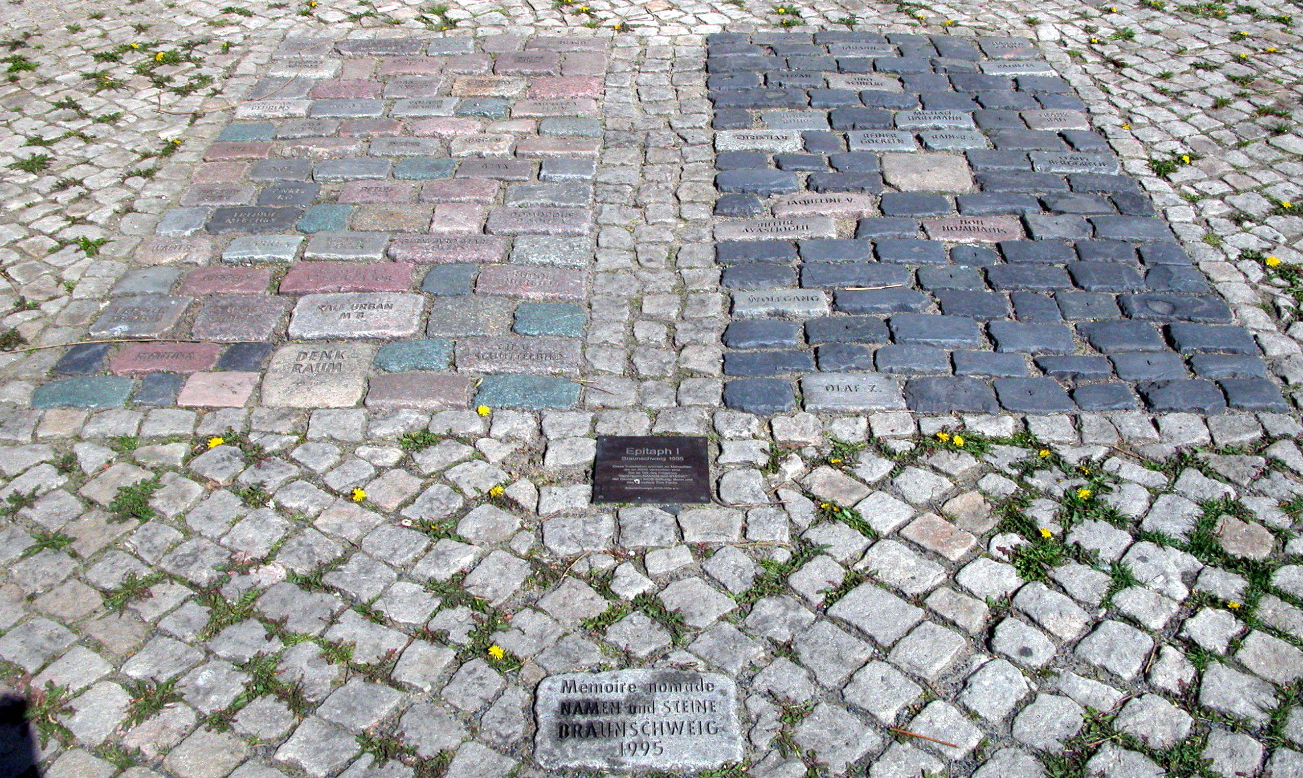 Braunschweig: „Epitaph I“ von Tom Fecht, Südseite der Martinikirche.